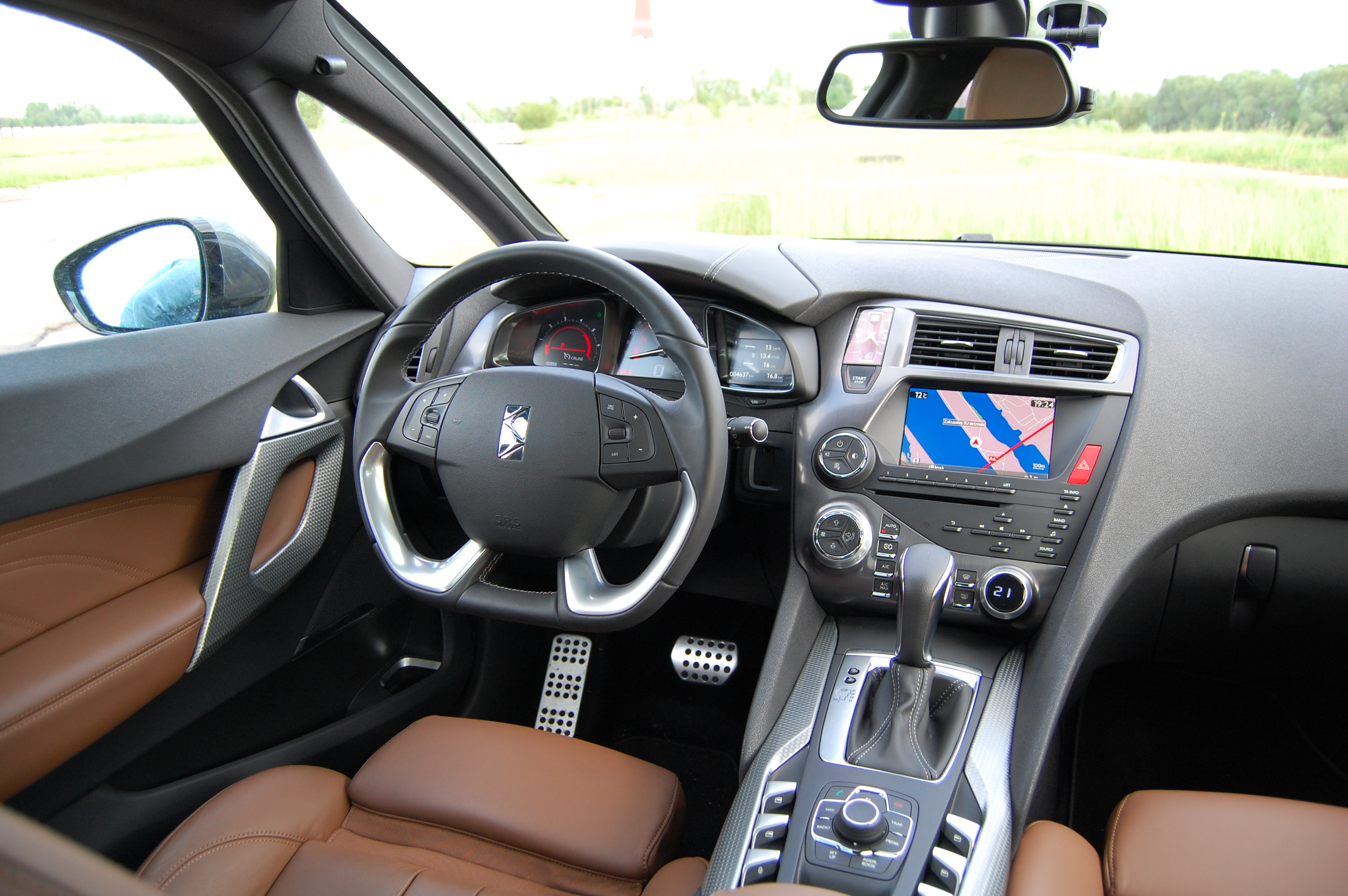 Citroen DS5 2012 46